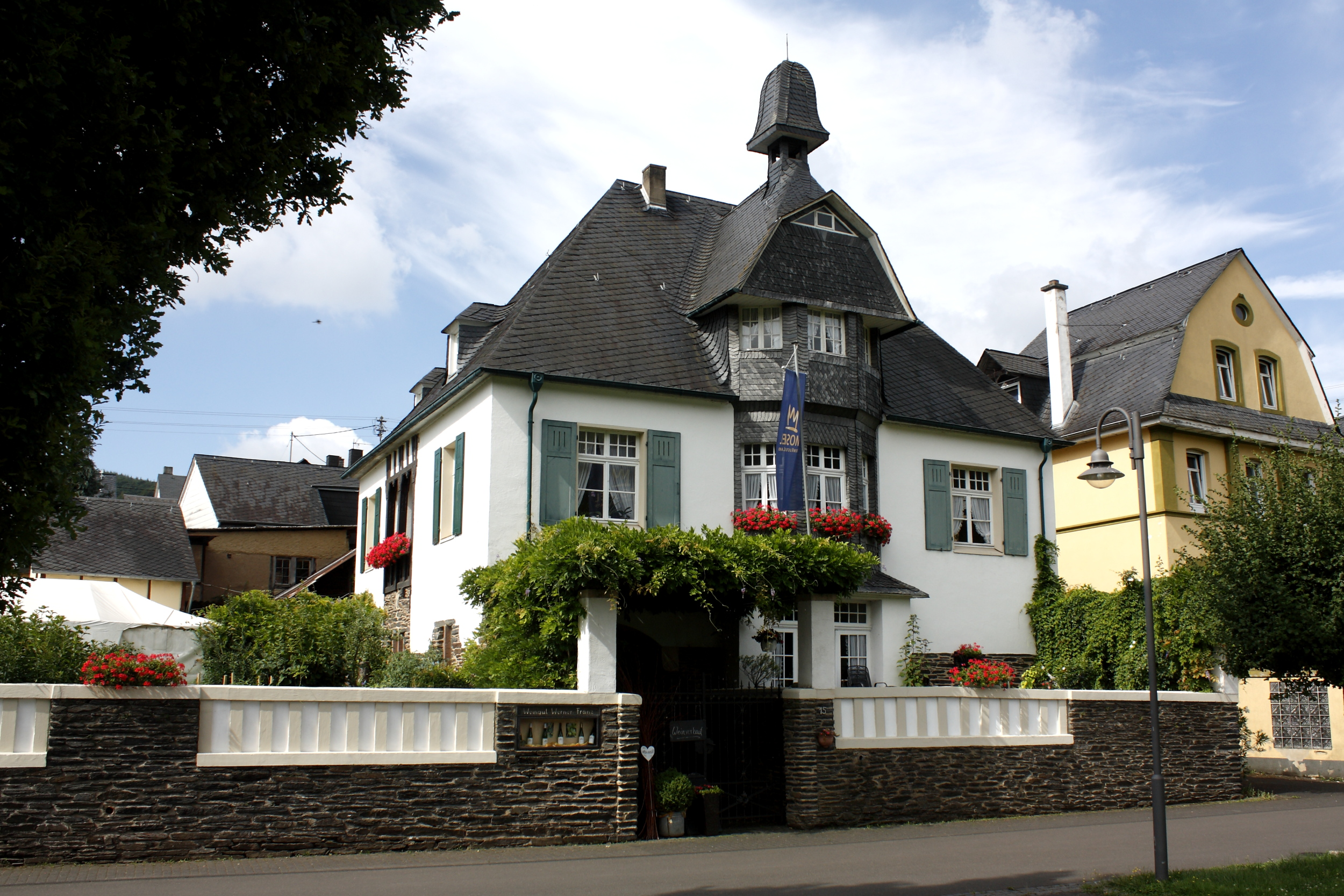 Winzerhaus im Jugendstil in Lösnich/Mosel, Gestade 15. Architekt: Prof. Bruno Möhring, Berlin